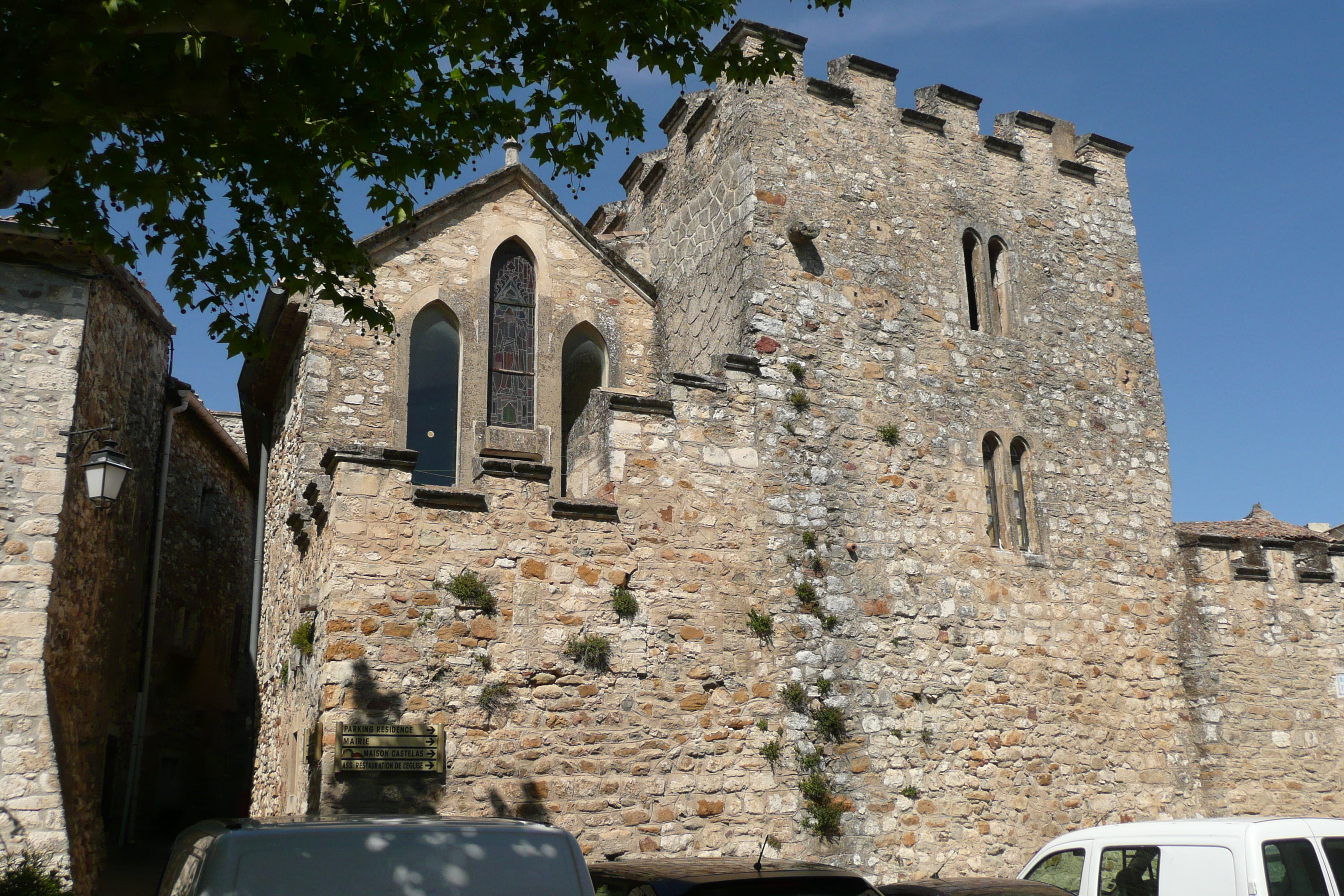 Aiguèze.